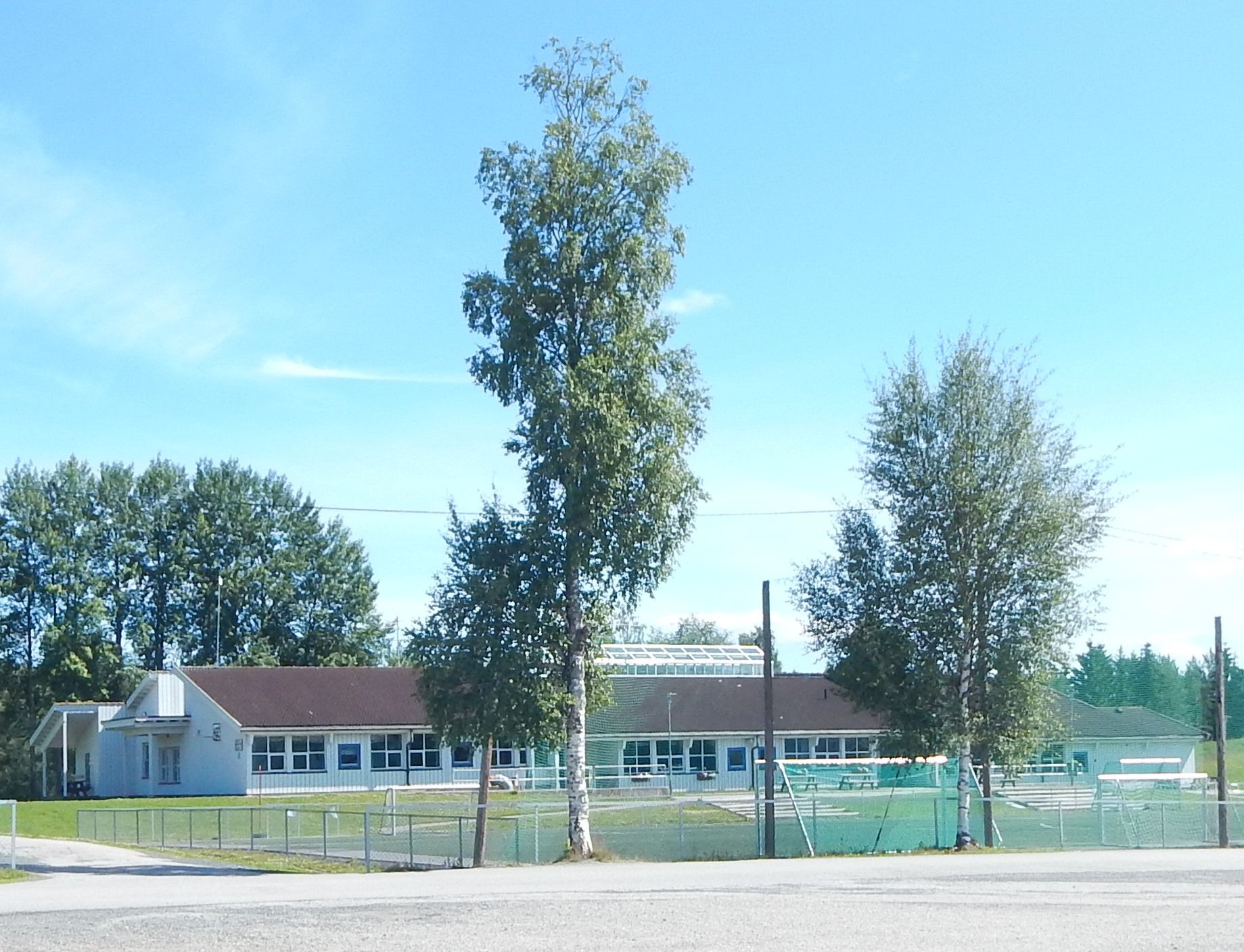 Hernes skole